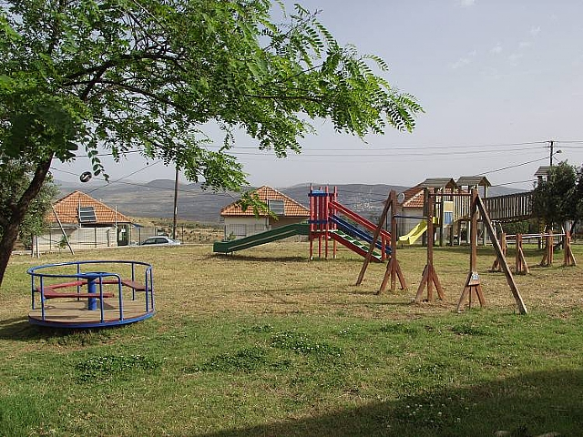 גן משחקים